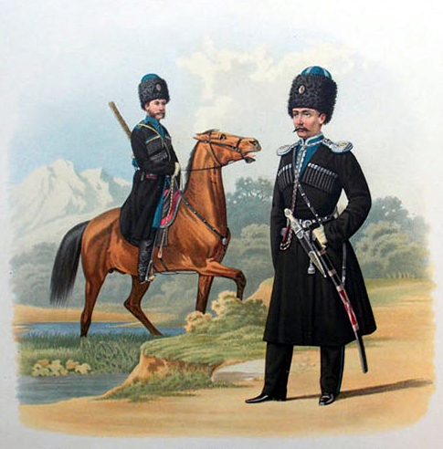 Конные полки Терского войска. (Казак и Обер Офицер парадная форма) 16 декабря 1871.